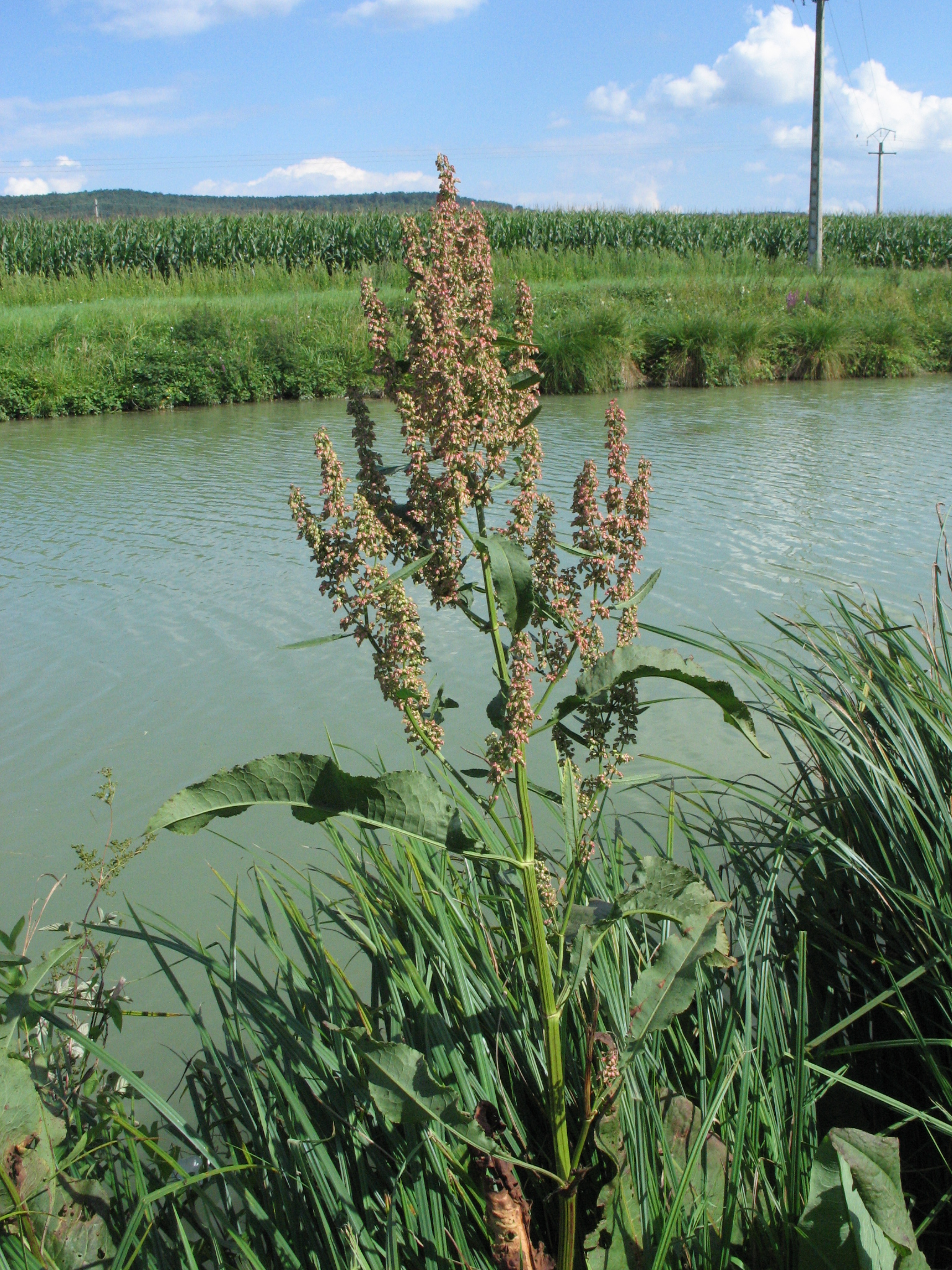 Rumex hydrolapathum Joinville, Haute-Marne, France.